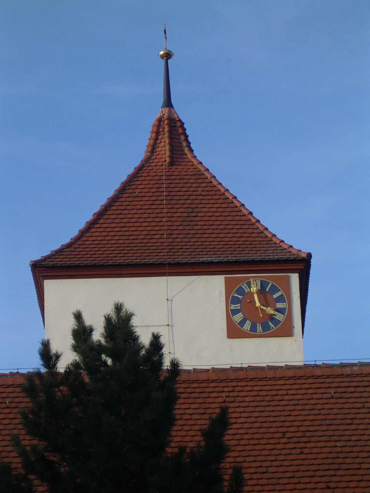 Turm der Trinitatiskirche in Rottenbauer